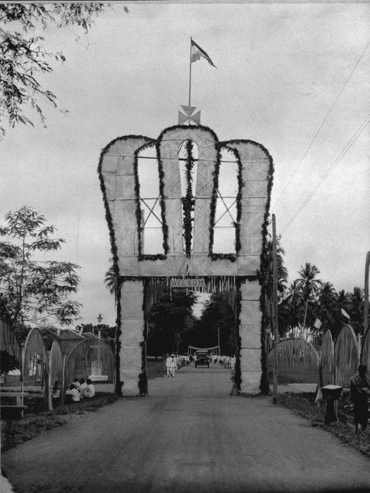 Foto. Ter herinnering aan het bezoek van Zijne Excellentie den Gouverneur-Generaal van Nederlandsch-Indië Mr. D. Fock aan de residentie Zuider- en Oosterafdeeling van Borneo (April 1924). Tijdelijke triomfboog 'Welkom' opgericht te Kandangan ter gelegenheid van de komst van de Gouverneur-Generaal van Nederlands-Oostindië mr. Dirk Fock, op rondreis door de Zuider- en Oosterafdeling van Borneo